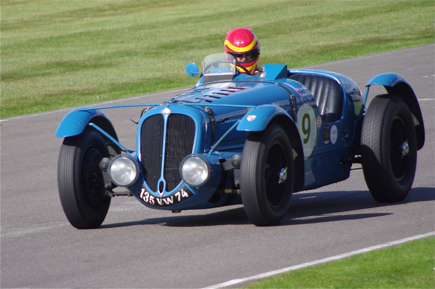 Goodwood Revival 2012